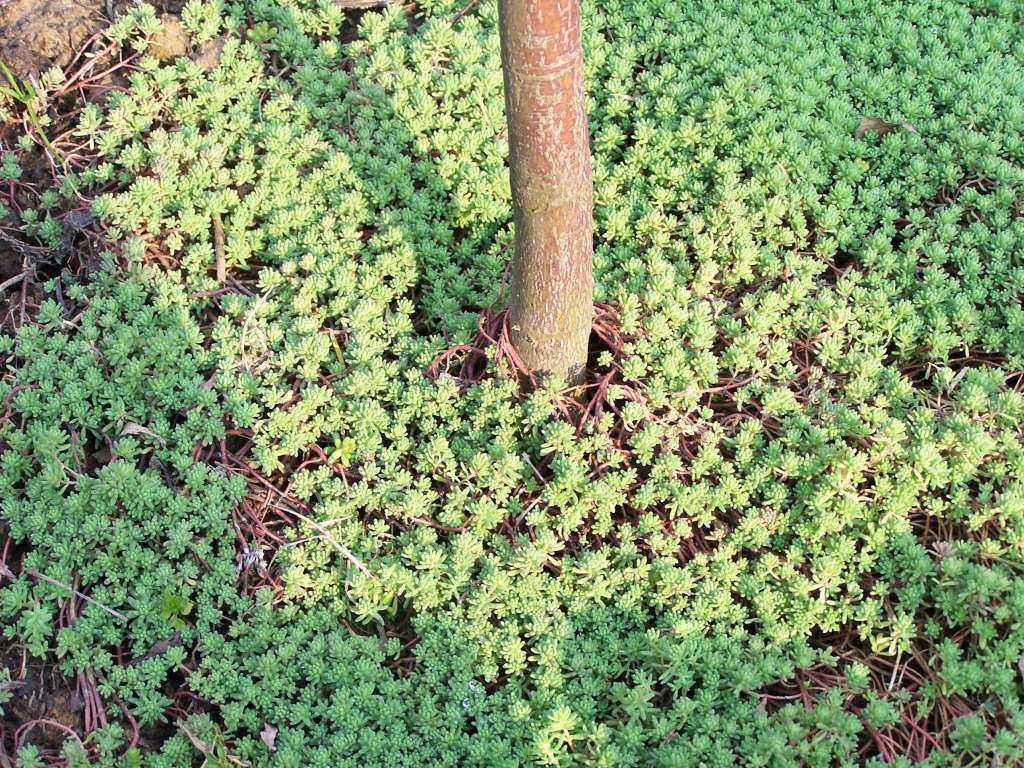 Sedum sp. Jeden z gatunków rozchodnika, jako roślina okrywowa. Autor: Jerzy Opioła Data: kwiecien 2006